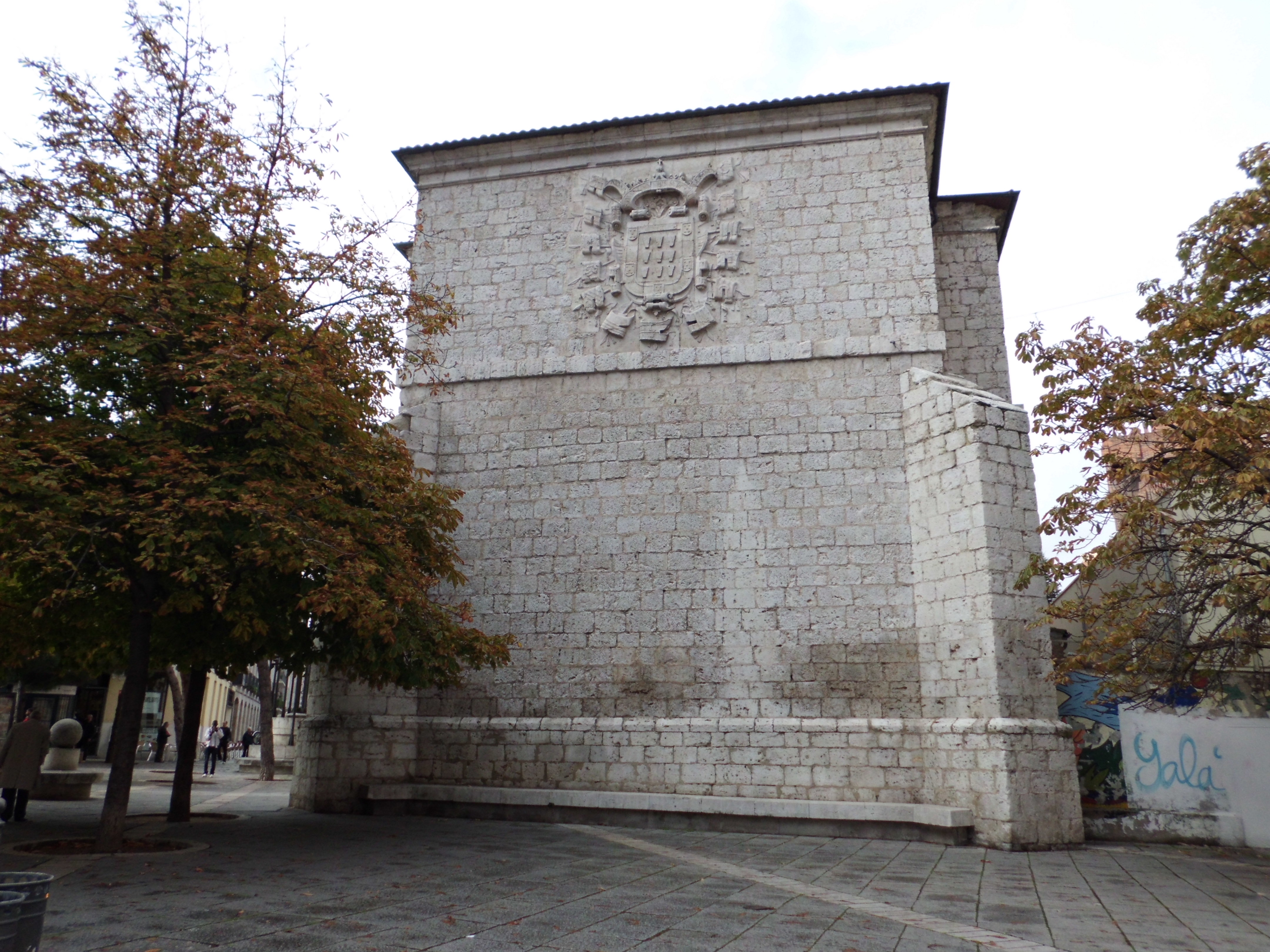 Ábside con escudo del conde de Gondomar de la Iglesia de San Benito el Viejo junto a la Casa del Sol del conde de Gondomar. Desde el 2011 es la sede de la exposición permanente de reproducciones artística en yeso. Pertenece al conjunto museístico del Museo de Escultura de Valladolid, España.